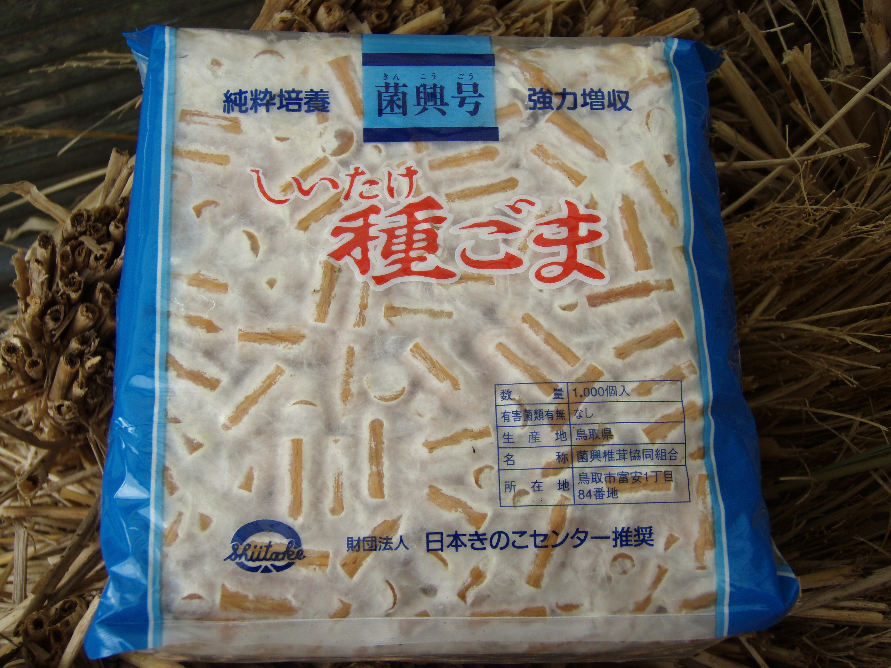 シイタケの種菌を増殖させた駒木の一例。